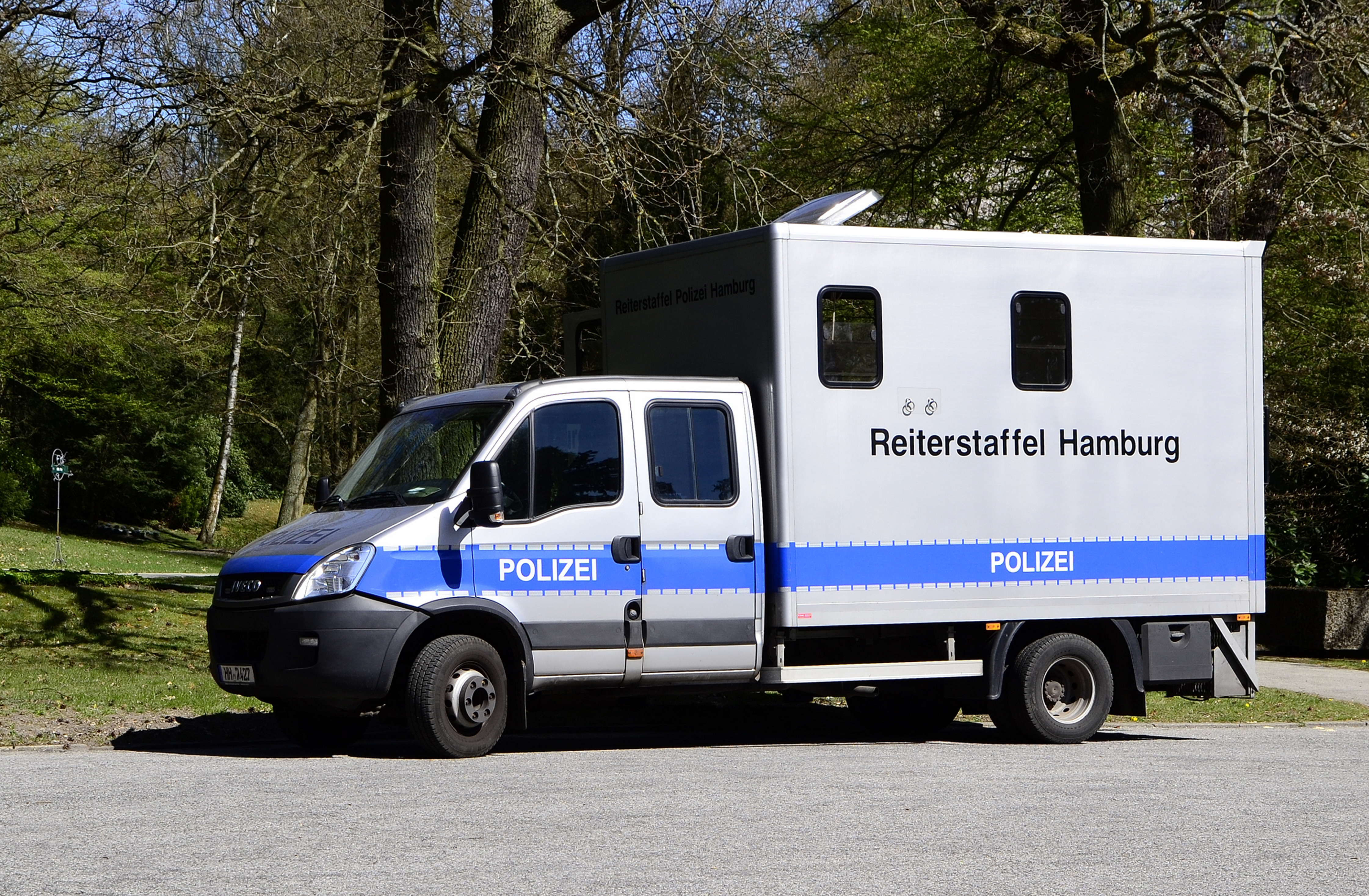 Iveco Daily 65 C 17 D EEV der Reiterstaffel Hamburg